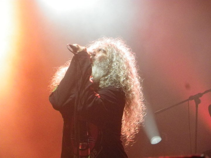 Yosi Domínguez cantando en un concierto de Los Suaves en la playa de Riazor en 2011